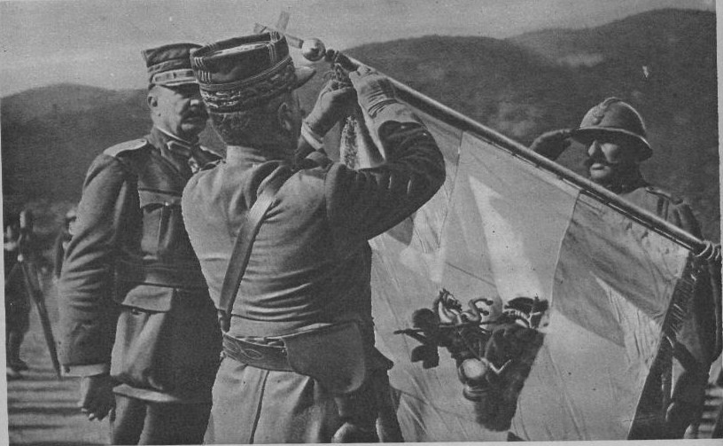 Dans Le Miroir n°250 15 Franchet d'Espérey décore le drapeau du 5eme regiment grec de la Division de l'Archipel. Elle participe de l'Armée Alliée d'Orient en Macédoine.